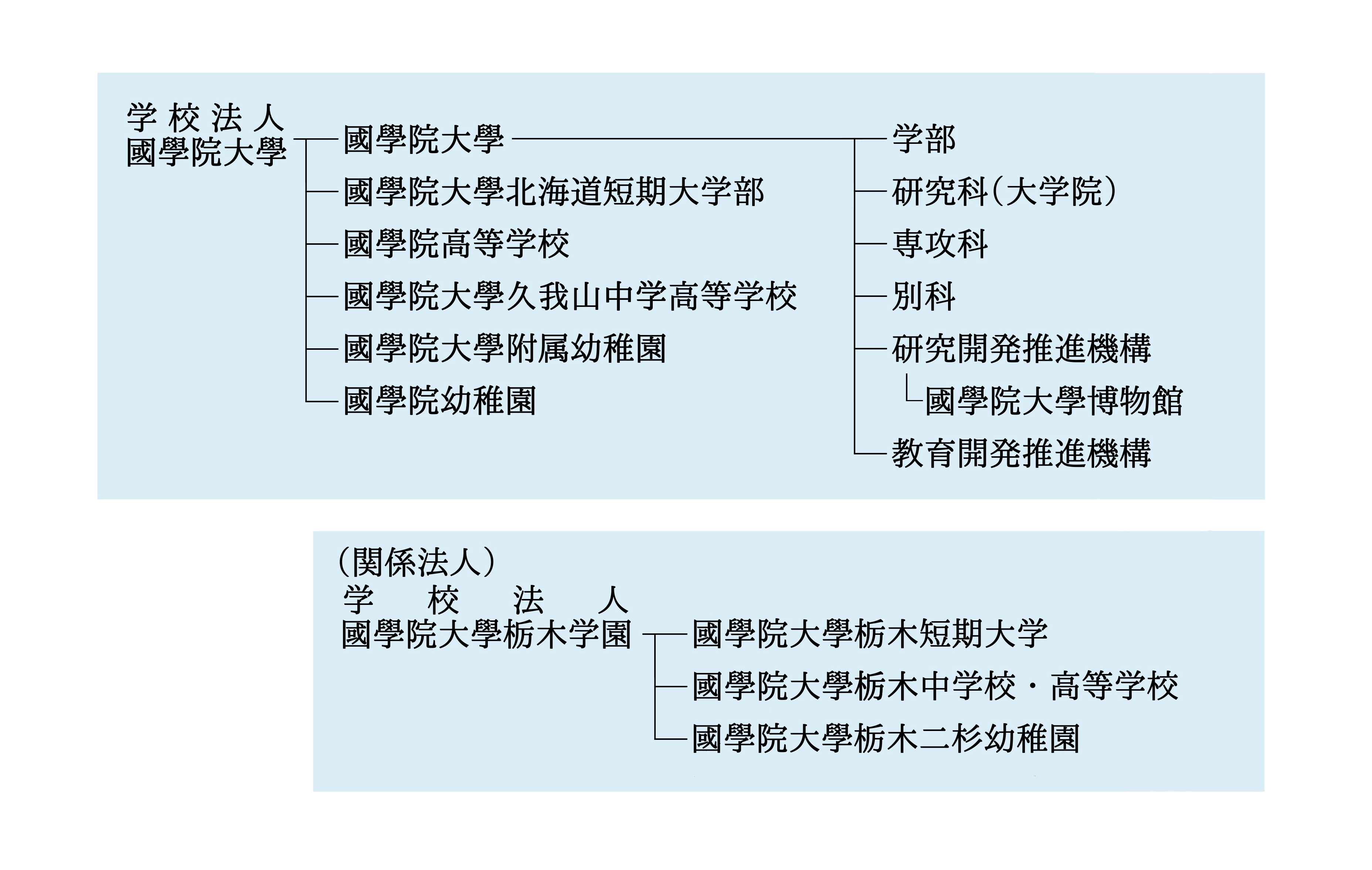 学校法人國學院大學および学校法人國學院大學栃木学園の組織図